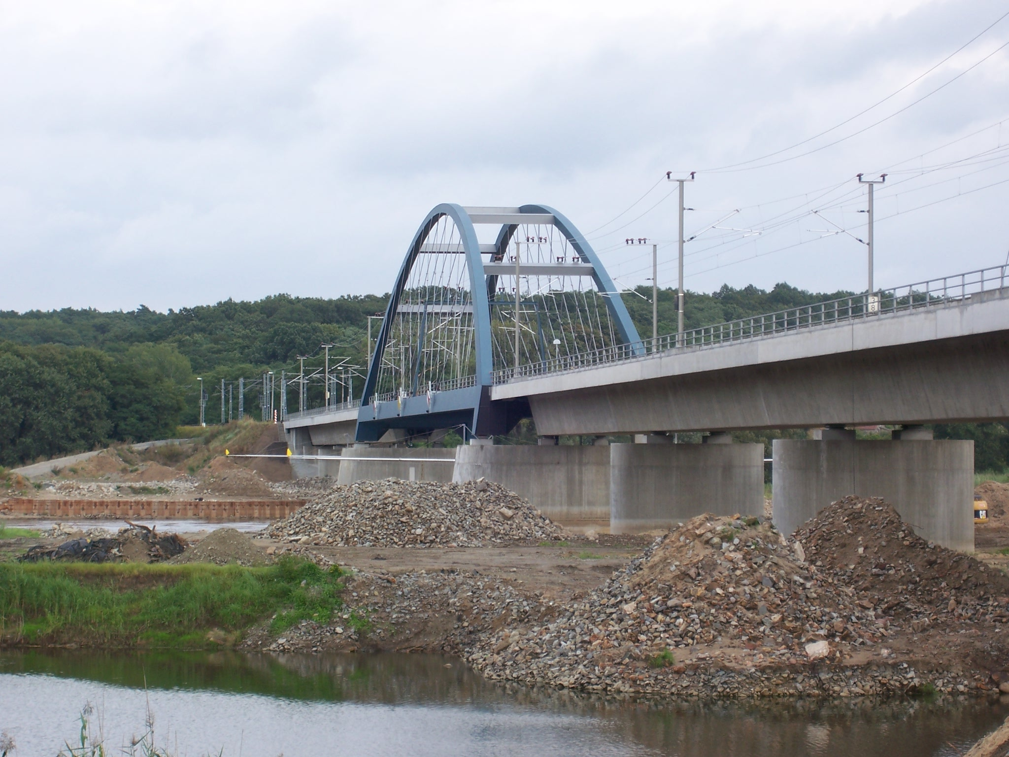 Oderbrücke Frankfurt (Eisenbahn), Bauarbeiten Ersatz-Neubau